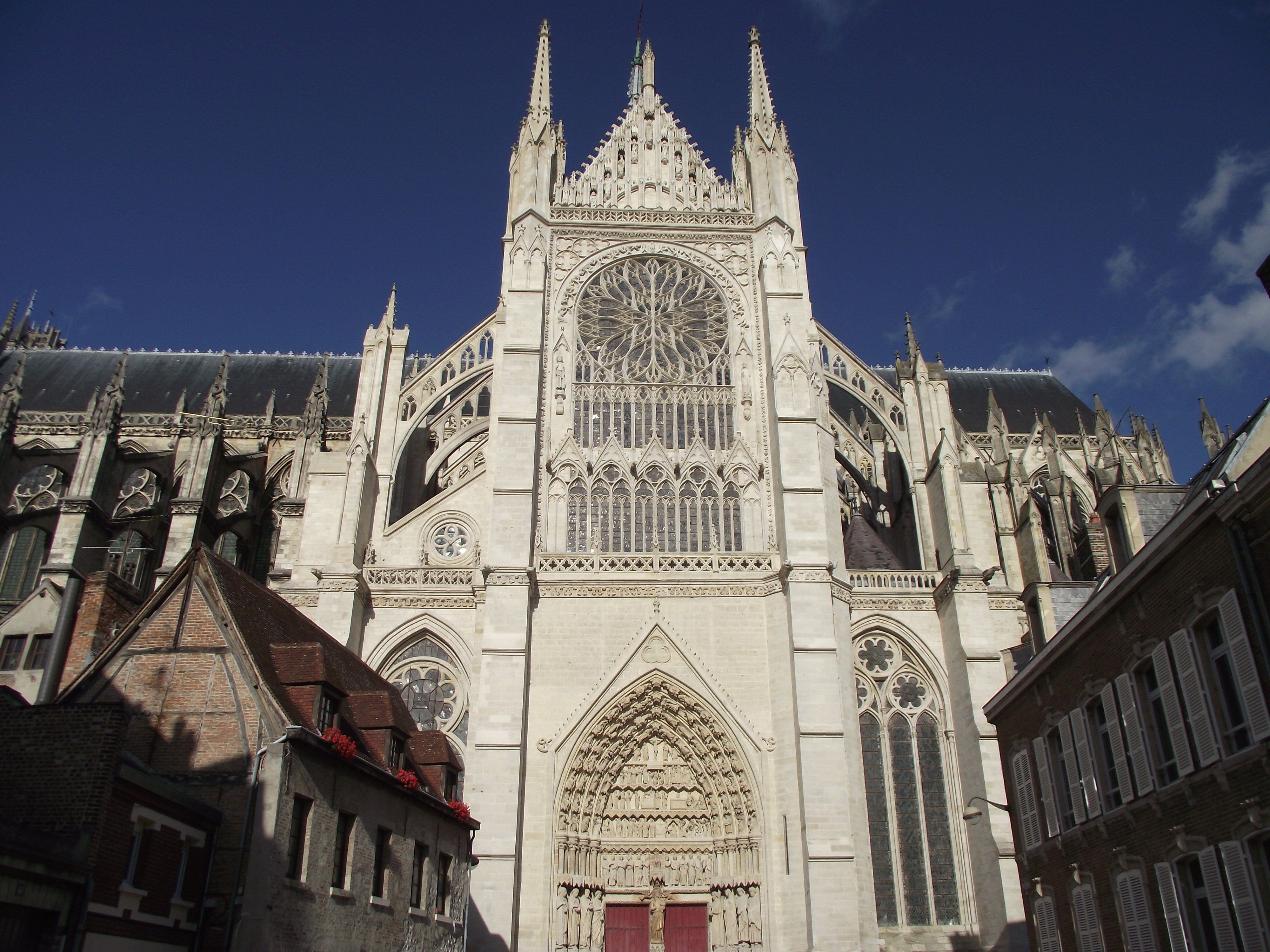 Amiens, Cathédrale de Notre-Dame, Façade sud